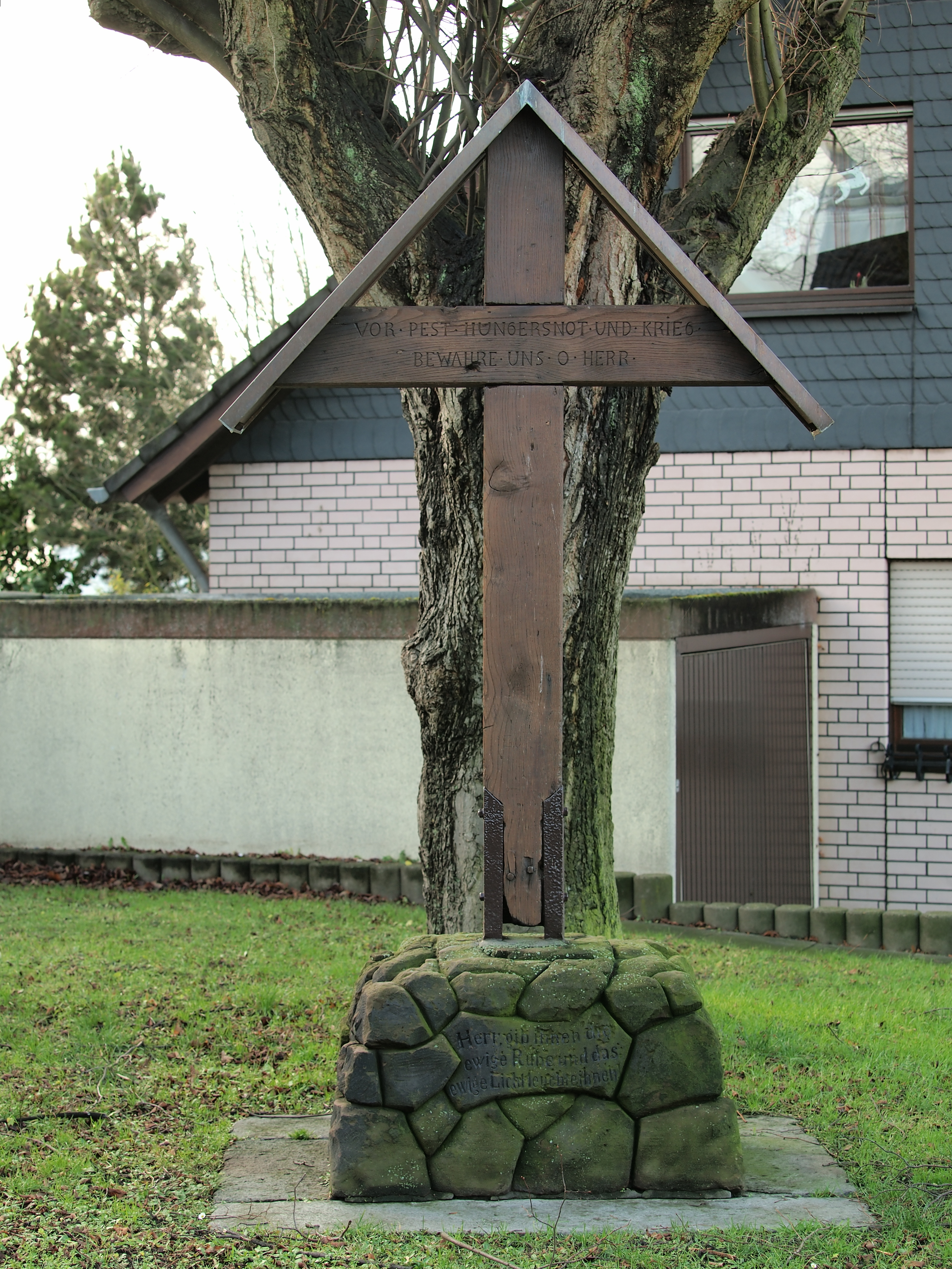 Pestkreuz, ursprünglich von 1635, mehrfach erneuert, über einem Massengrab von an der Pest gestorbenen. Standort: Herne-Sodingen, Straße: An der Linde. Inschrift im Kreuzbalken: Vor Pest Hungersnot und Krieg bewahre uns o Herr. Inschrift im Kreuzsockel: Herr, gib ihnen die ewige Ruhe und das ewige Licht leuchte ihnen!